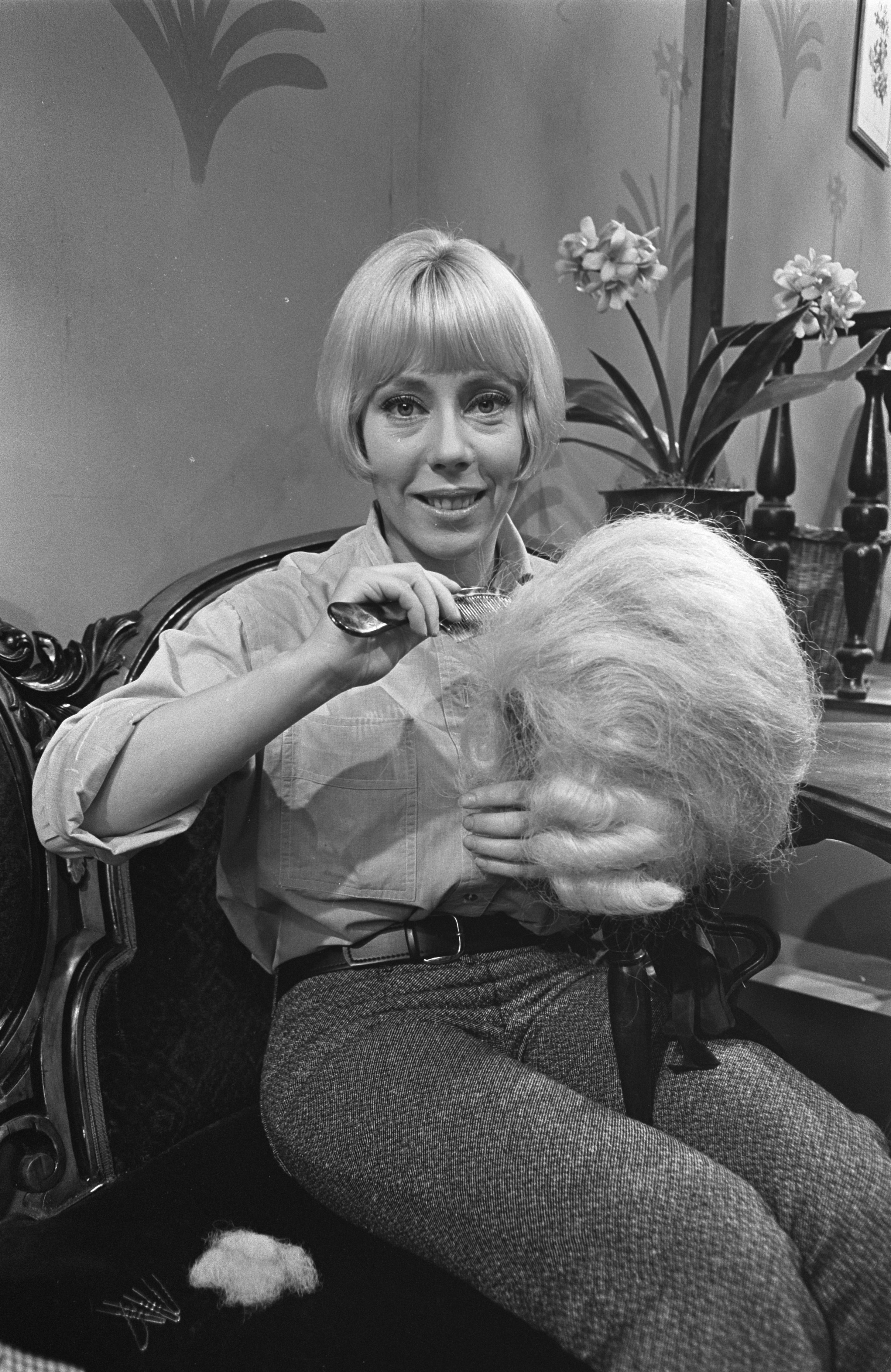 Televisieserie 'Ja zuster, nee zuster' van de VARA. Pruikenmaakster Jet is een personage gespeeld door Carla Lipp